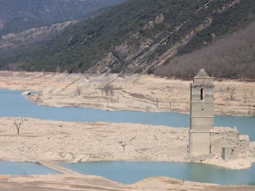 Cuando inundaron el pueblo de Mediano (Huesca) con el embalse del mismo nombre, echaron abajo todas las casas, pero no tuvieron valor de echar abajo la iglesia. Si bien la torre, se ve normalmente (el agua llega hasta el ventanal)en años de sequía como este, emerge completamente.